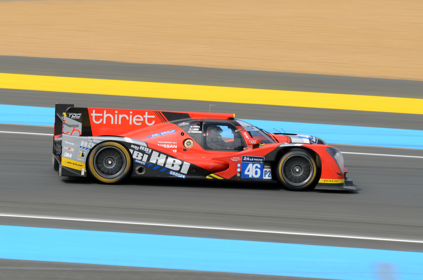 L'Oreaca 05- Nissan de l'écurie Thiriet by TDS Racing pilotée par Pierre Thiriet, Ludovic Badey et Tristan Gommendy lors des 24 Heures du Mans 2018